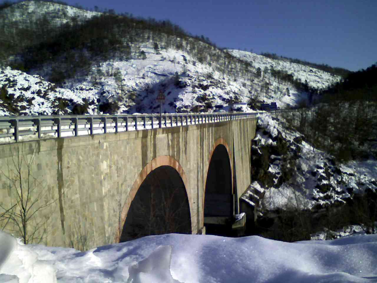 Il ponte sul fiume Erro della strada provinciale 334 del Sassello, presso Miogliola, Pareto (provincia di Alessandria, Piemonte)